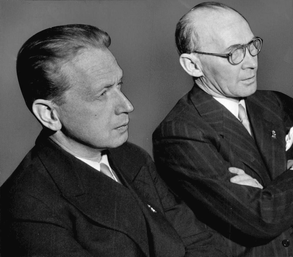 Stadsrådet Dag Hammarskjöld och landshövding Ragnar Casparsson på Arosmässan i Västerås.